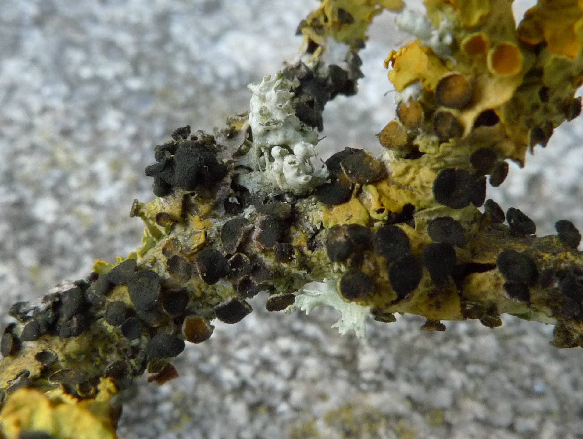 Xanthoriicola physciae, champignon lichénicole sur Xanthoria parietina, sur Prunus spinosa, Trez Goarem (Esquibien, Finistère, Bretagne)